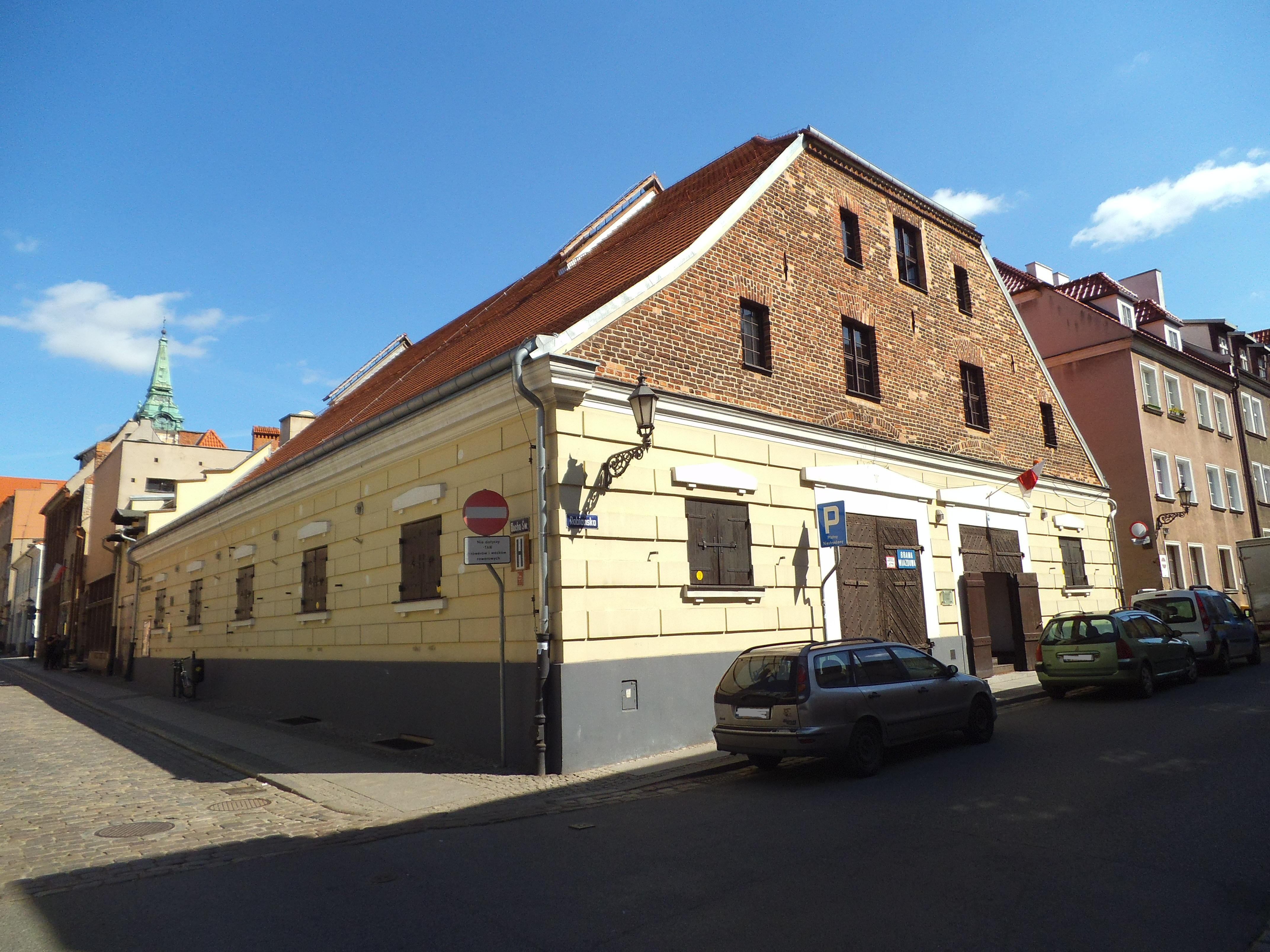 Galeria sztuki Wozownie w Toruniu